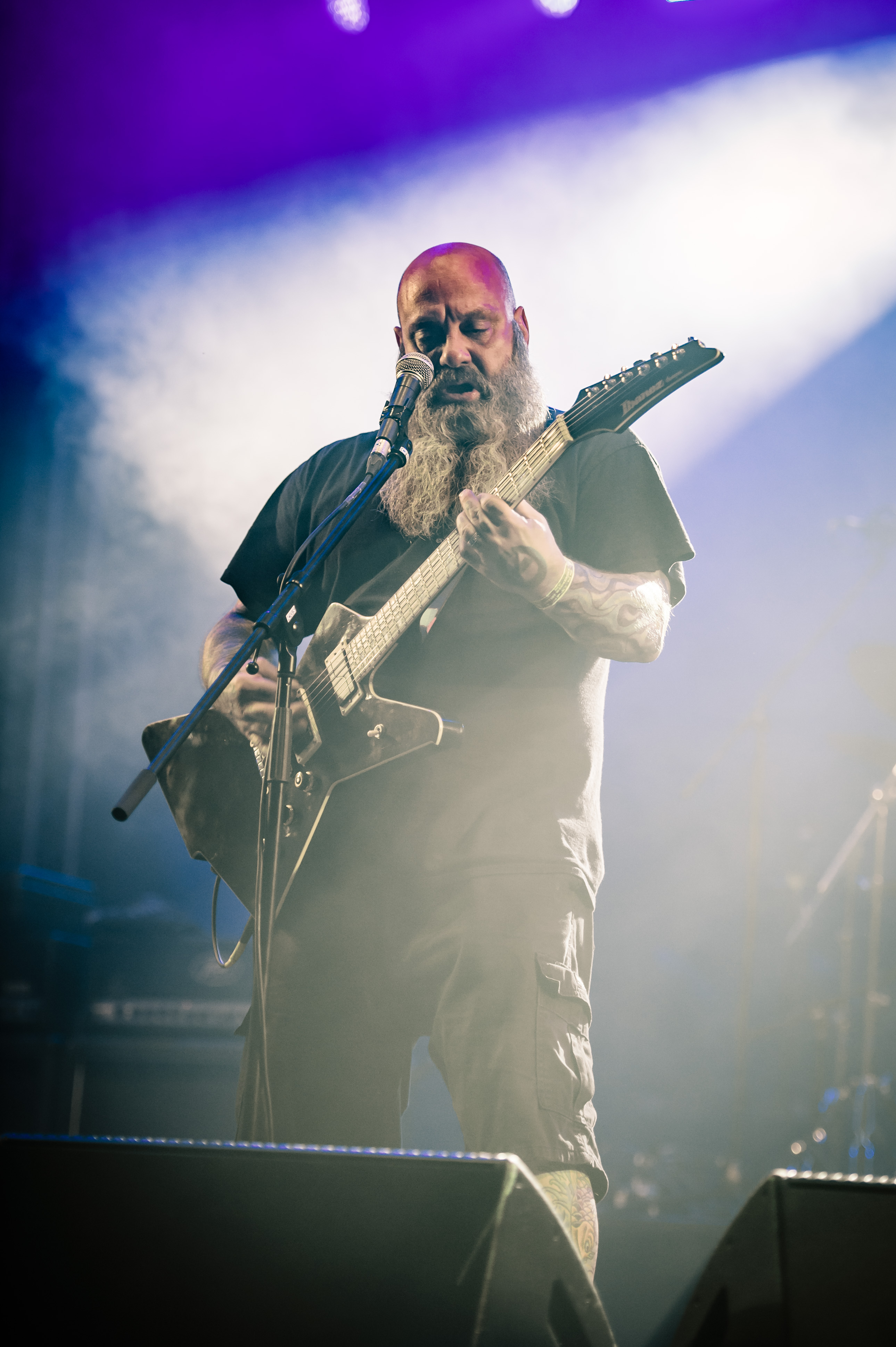 'Wacken Open Air 2017; Wacken': 'Crowbar'